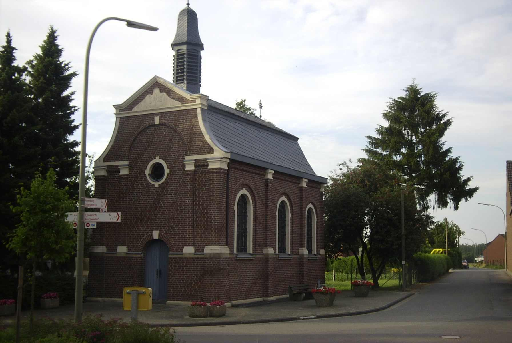 Summary Bildbeschreibung: Berverather Kapelle Quelle: eigenes Foto Fotograf/Zeichner: bodoklecksel 20:44, 25. Jun 2006 (CEST) Datum: Juni 2006 Sonstiges: ...